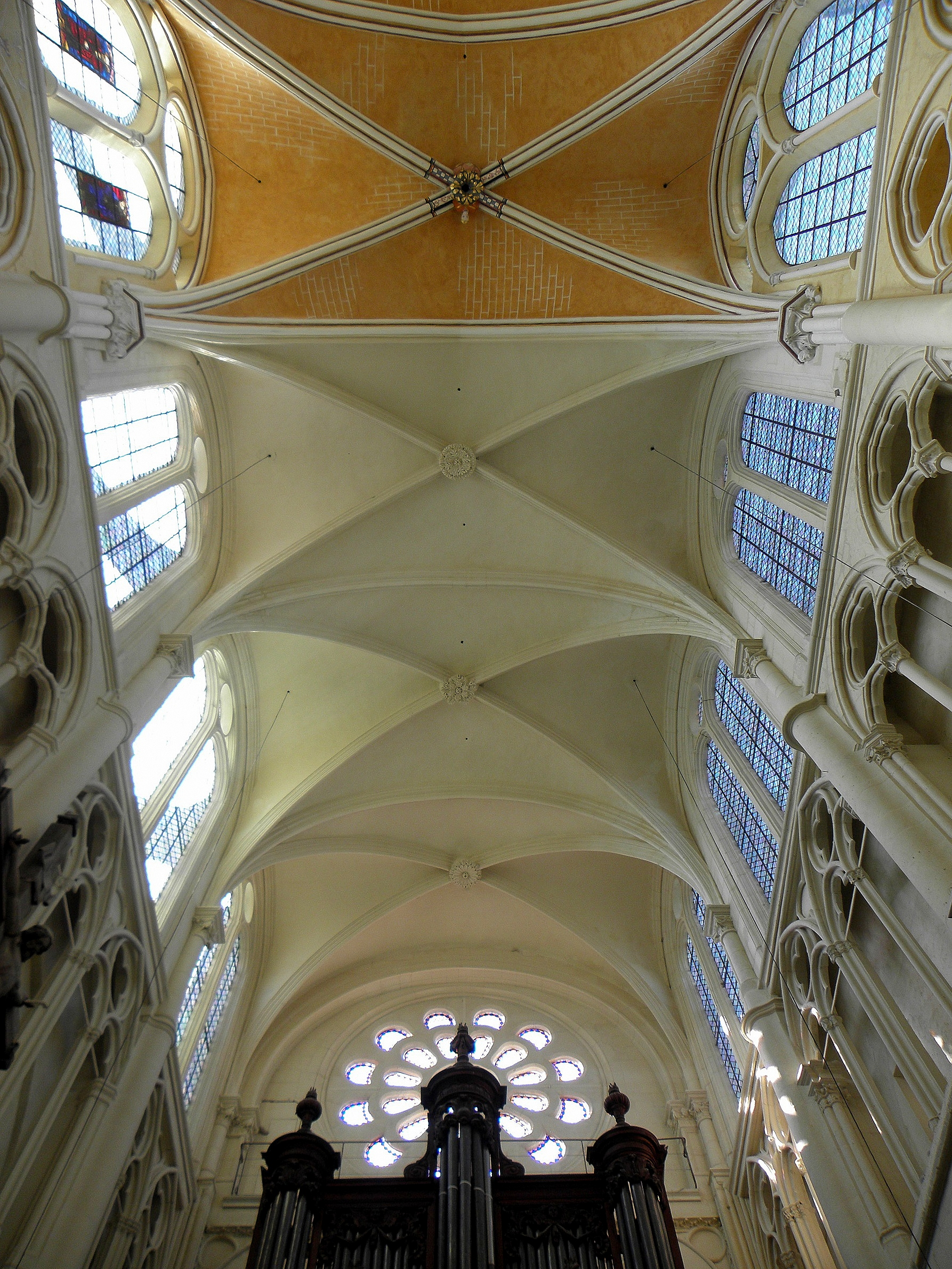 Intérieur de l'église Sainte-Étienne de Brie-Comte-Robert (77). Vue vers l'ouest des quatre premières voûtes du vaisseau principal.